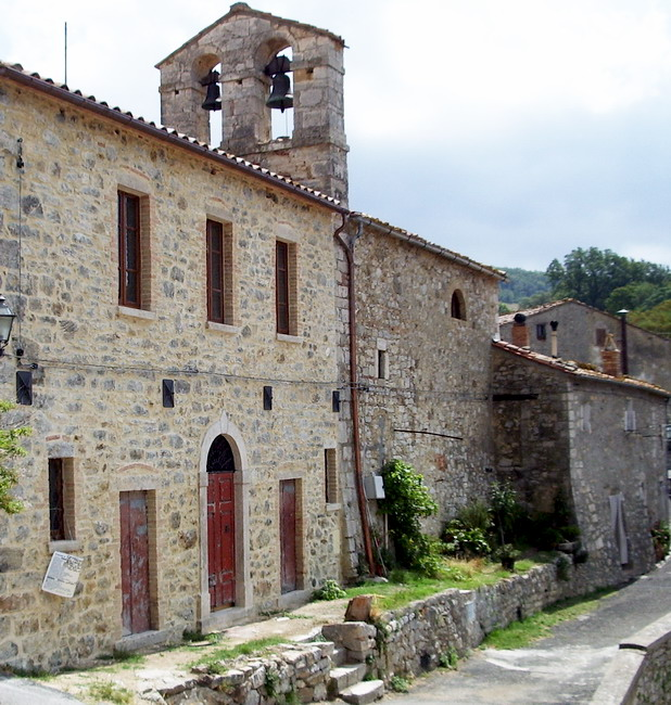 Ex canonica e abside Chiesa della Consolazione Rocchette di Fazio (GR)